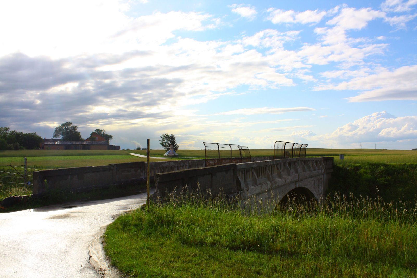 kolejowy wiadukt we wsi Podgór